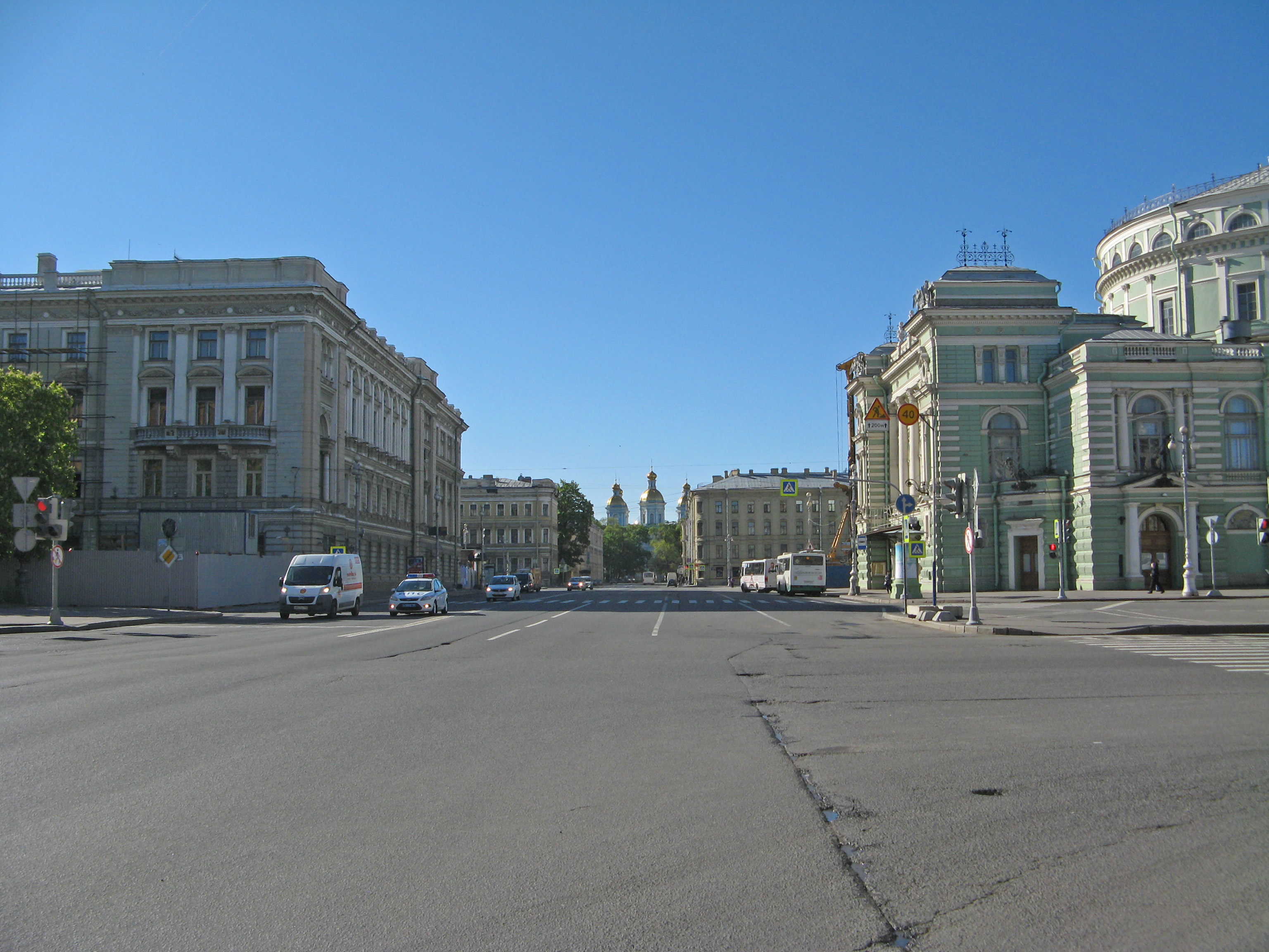 Театральная площадь, Санкт-Петербург